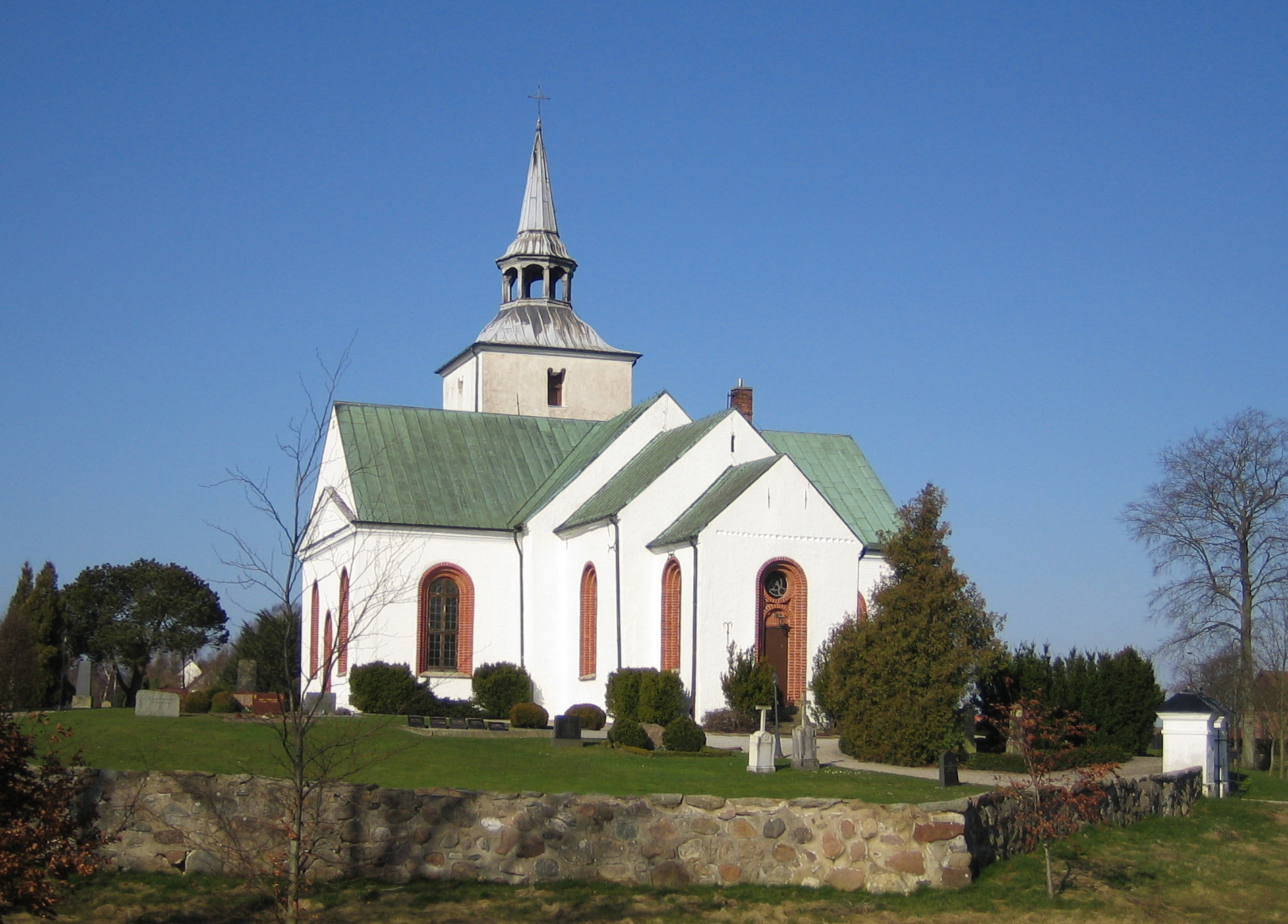 Reslövs kyrka in Skåne, Sweden